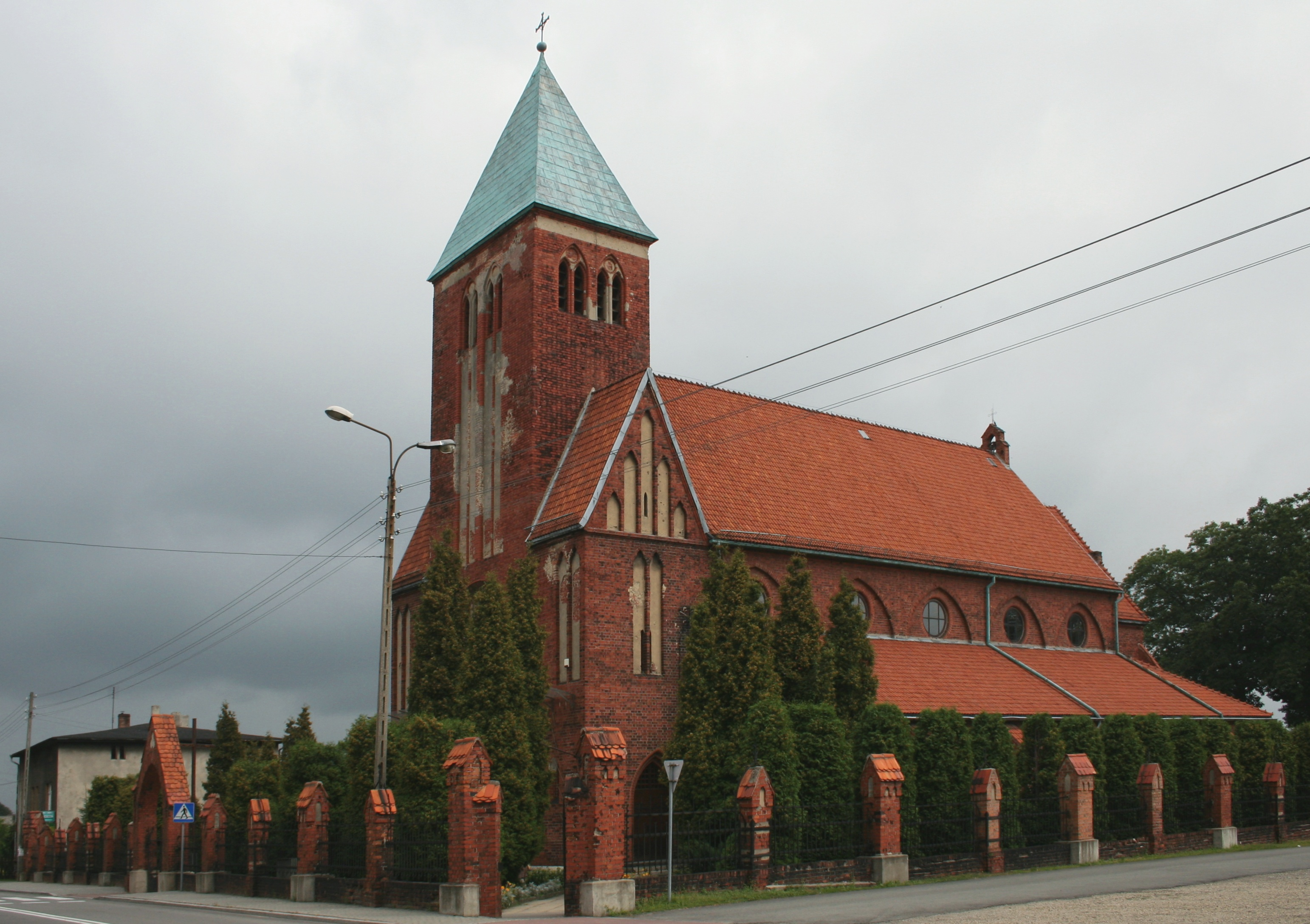 kościół św. Małgorzaty w Lyskach powiat rybnicki